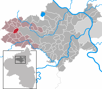 Virneburg in Rhineland-Palatinate - district Mayen-Koblenz